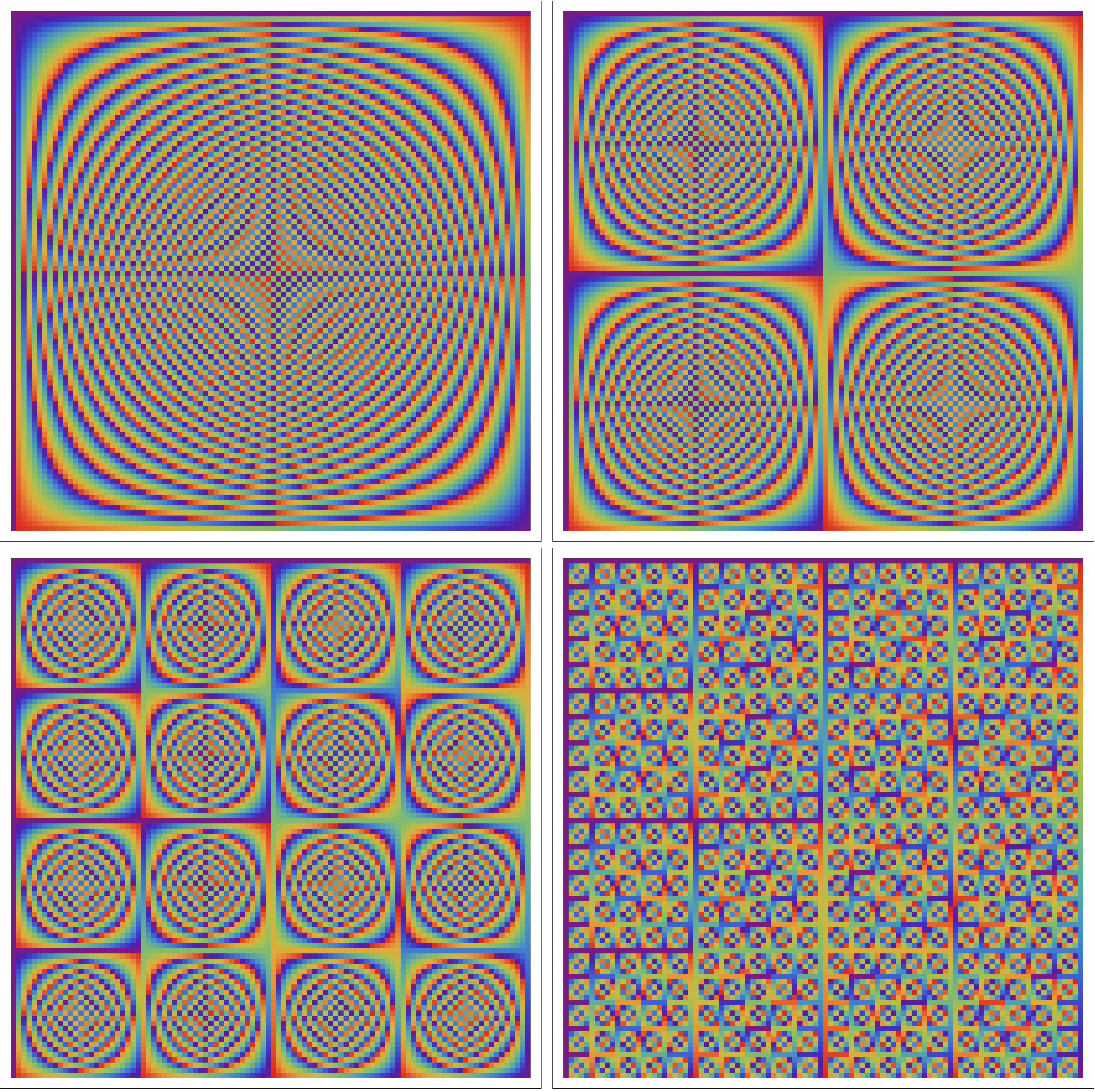 データ数100の離散フーリエ変換の模式図。色は1の100乗根の偏角を表す。この図で表される行列をデータ列にかけることで元データの離散フーリエ変換が得られる。 この行列の列を並び替えることで、元の行列のパターンは最終的にデータ数5の離散フーリエ変換のパターンに分解できる。